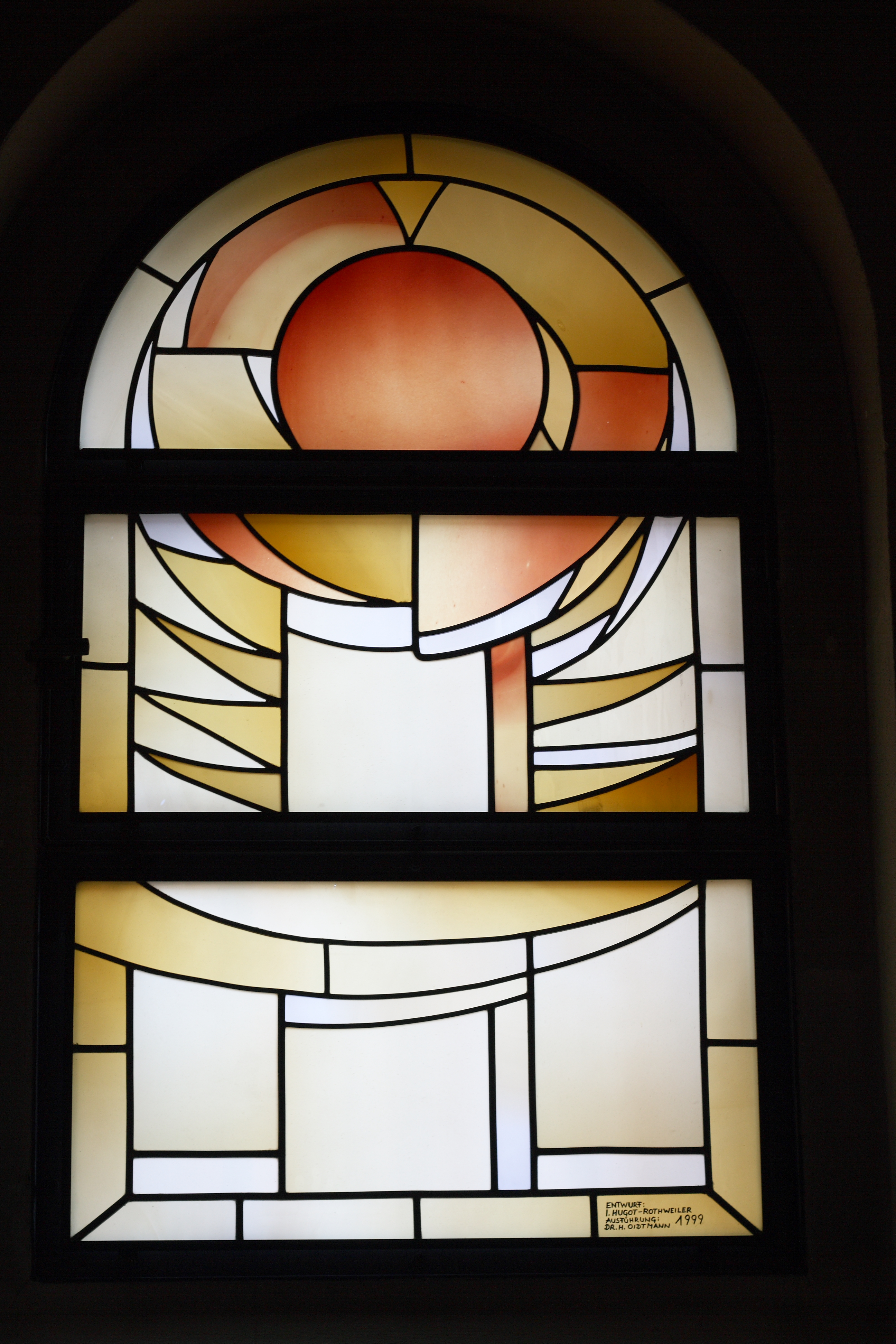 Bleiglasfenster in der katholischen Pfarrkirche St. Severin in Mehlem, einem Ortsteil von Bonn; rechts unten Signatur: ENTWURF: I. HUGOT-ROTHWEILER AUSFÜHRUNG: DR. H. OIDTMANN 1999